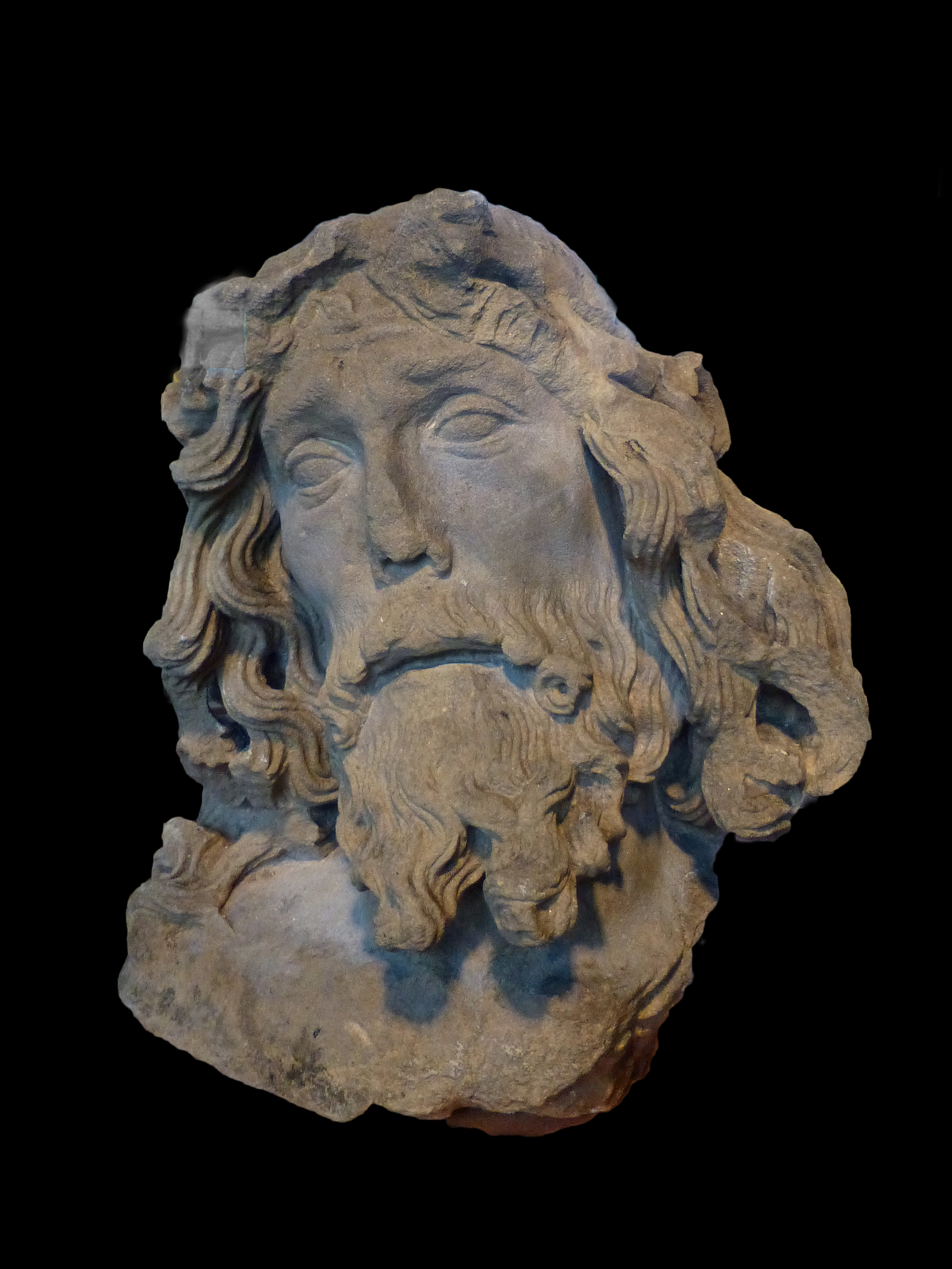 Musée historique de Haguenau (Bas-Rhin) : tête de Christ couronnée d'épines, grès, 1494 ? La statue a été détruite à la Révolution, seule la tête a été conservée. Sa facture renvoie vers le sculpteur qui a exécuté la Vierge à l'Enfant trouvée rue des Veaux à Strasbourg et conservée au Musée de l'Oeuvre Notre-Dame.